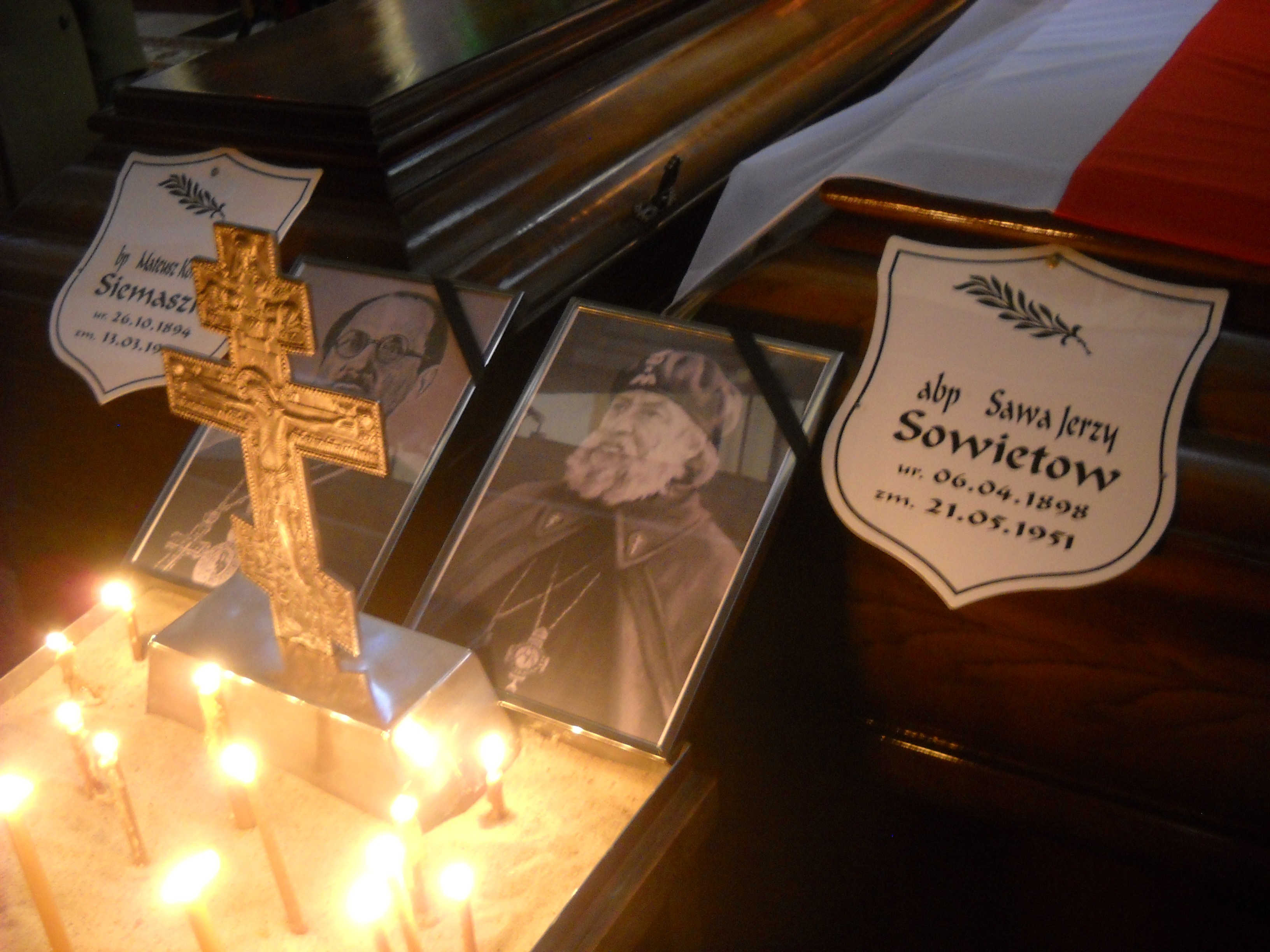 Powtórny pogrzeb biskupów Sawy (Sowietowa) i Mateusza (Siemaszki) na cmentarzu prawosławnym w Warszawie.